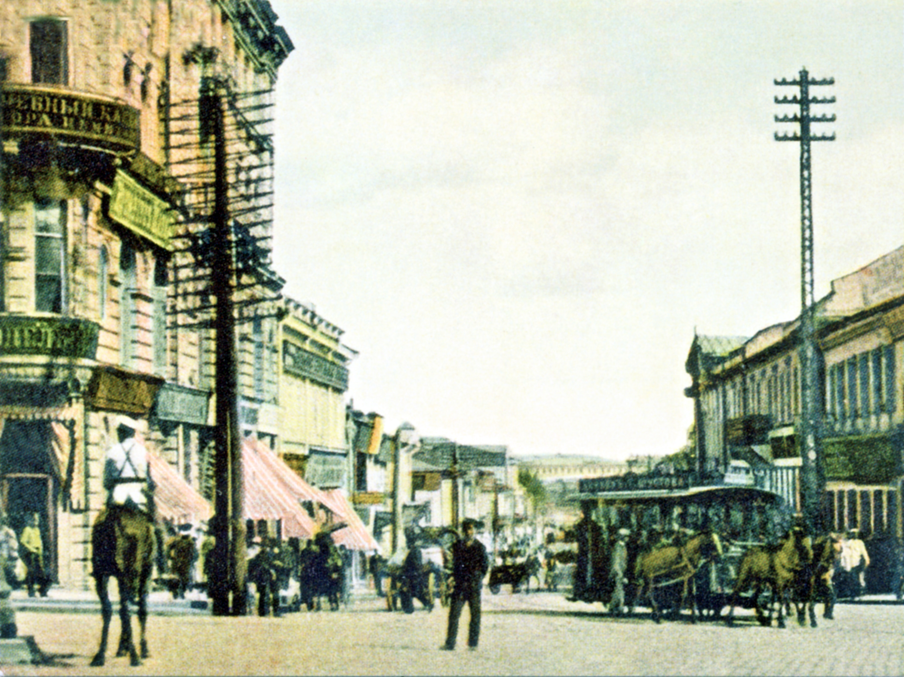 Paper Postcard of the Russian Empire The beginning of Moskovsky prospekt, Kharkov Открытое письмо (почтовая открытка), выпущенная в Российской Империи в начале 1900-х годов. Начало Московской улицы в Харькове, вид от угла Николаевской площади. Слева спереди 4-х этажное здание кондитерской Жоржа Бормана (ныне Восточные сладости).